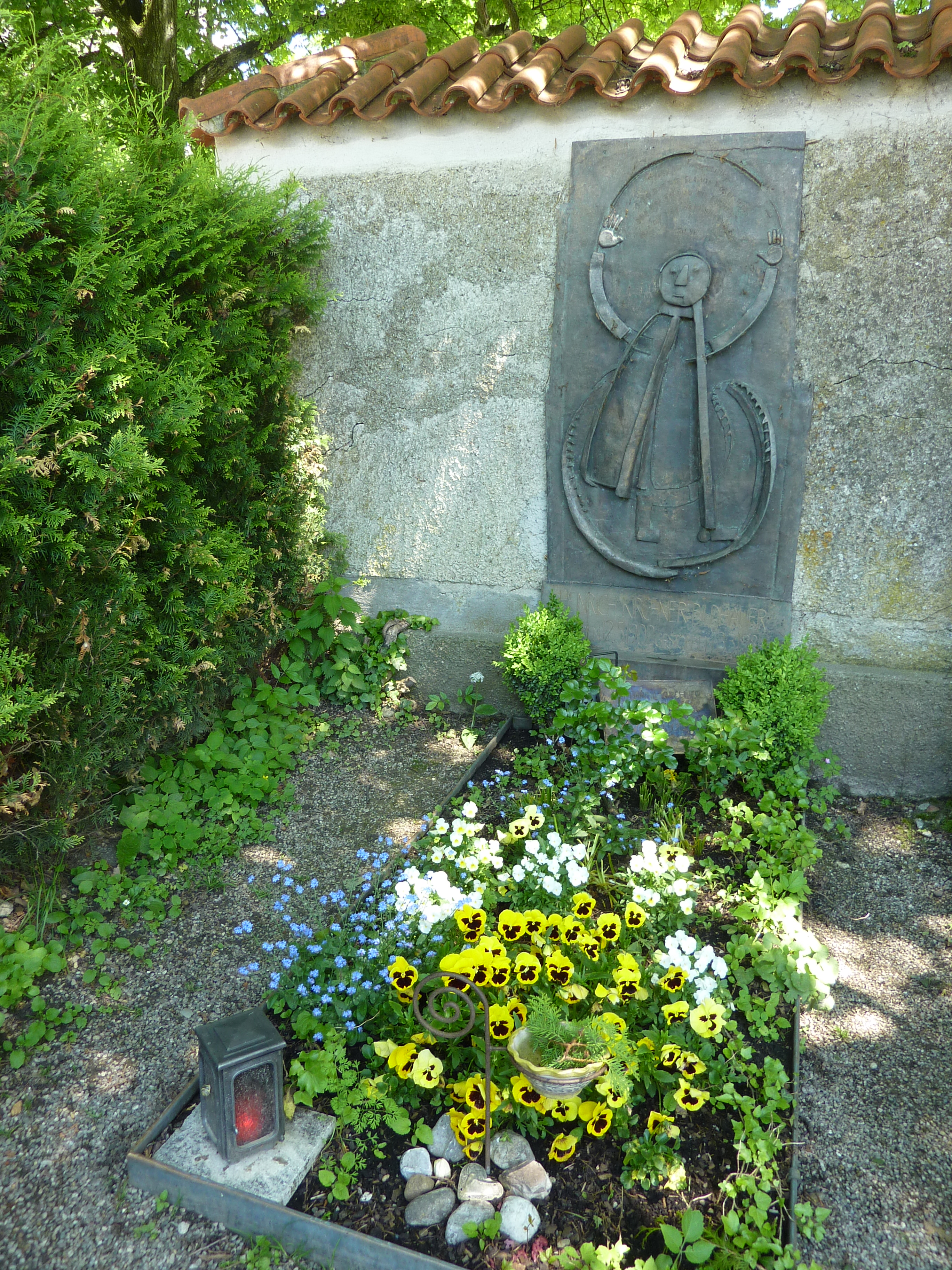 Grab von Heinrich Kirchner, Fraueninsel